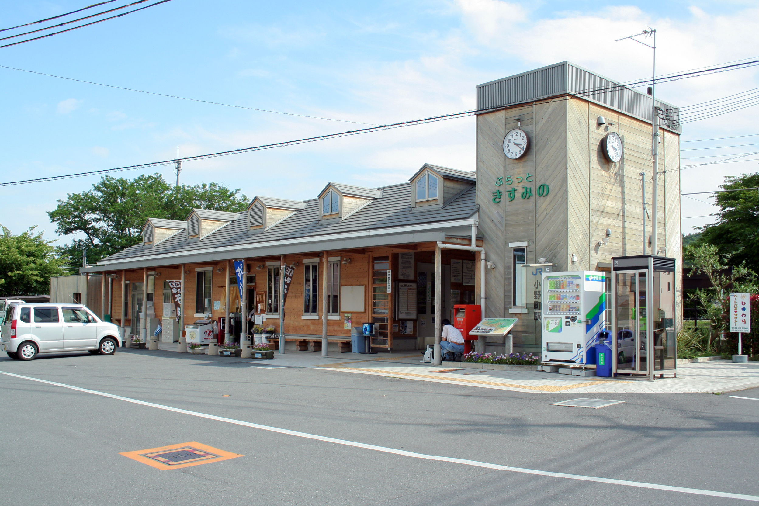 兵庫県小野市にあるJR西日本の鉄道駅の一つ、小野町駅。 駅舎全景。